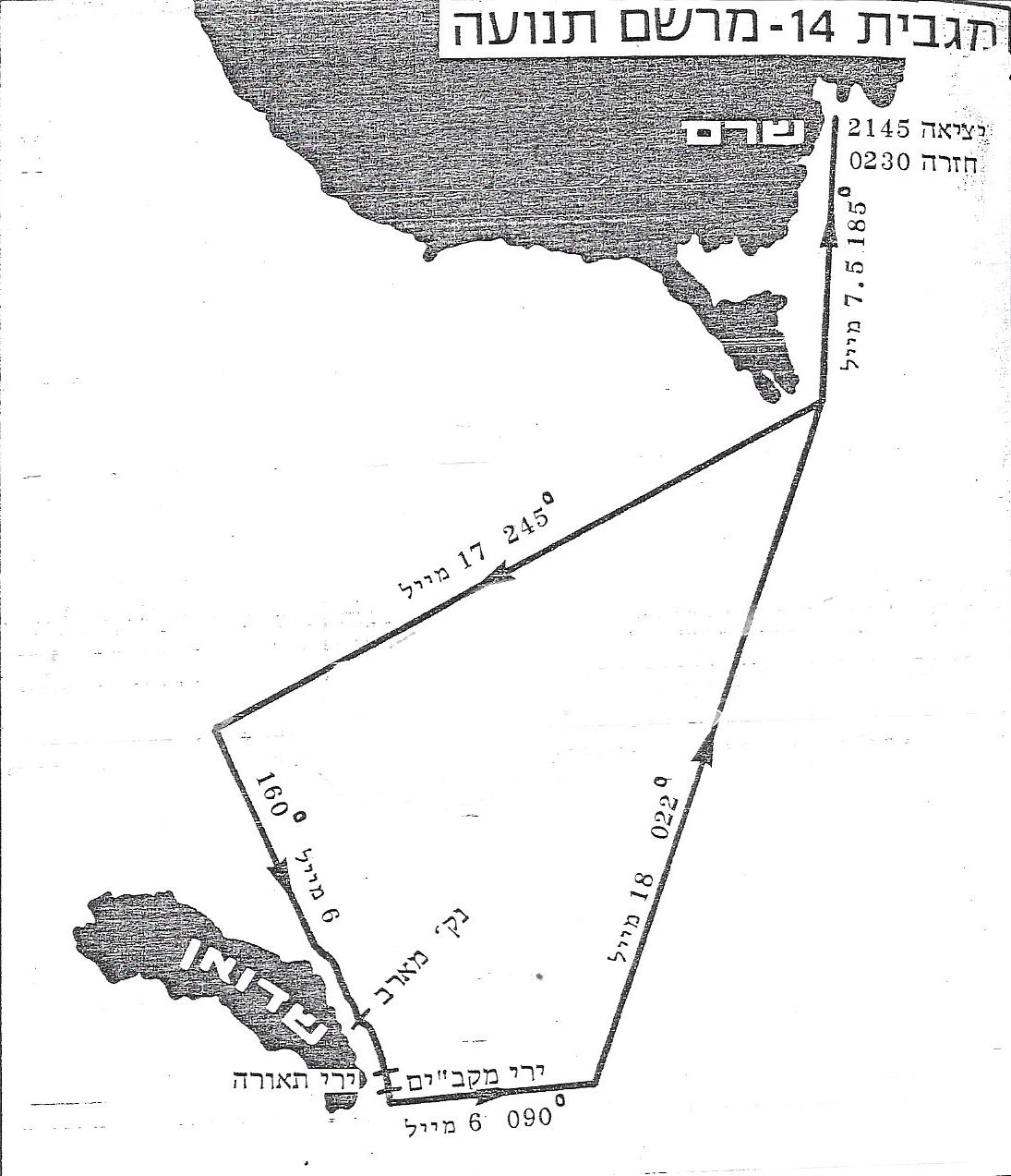 תרשים תנועת הסנוניות בסיור אלים ליד האי שדואן מגבית 14